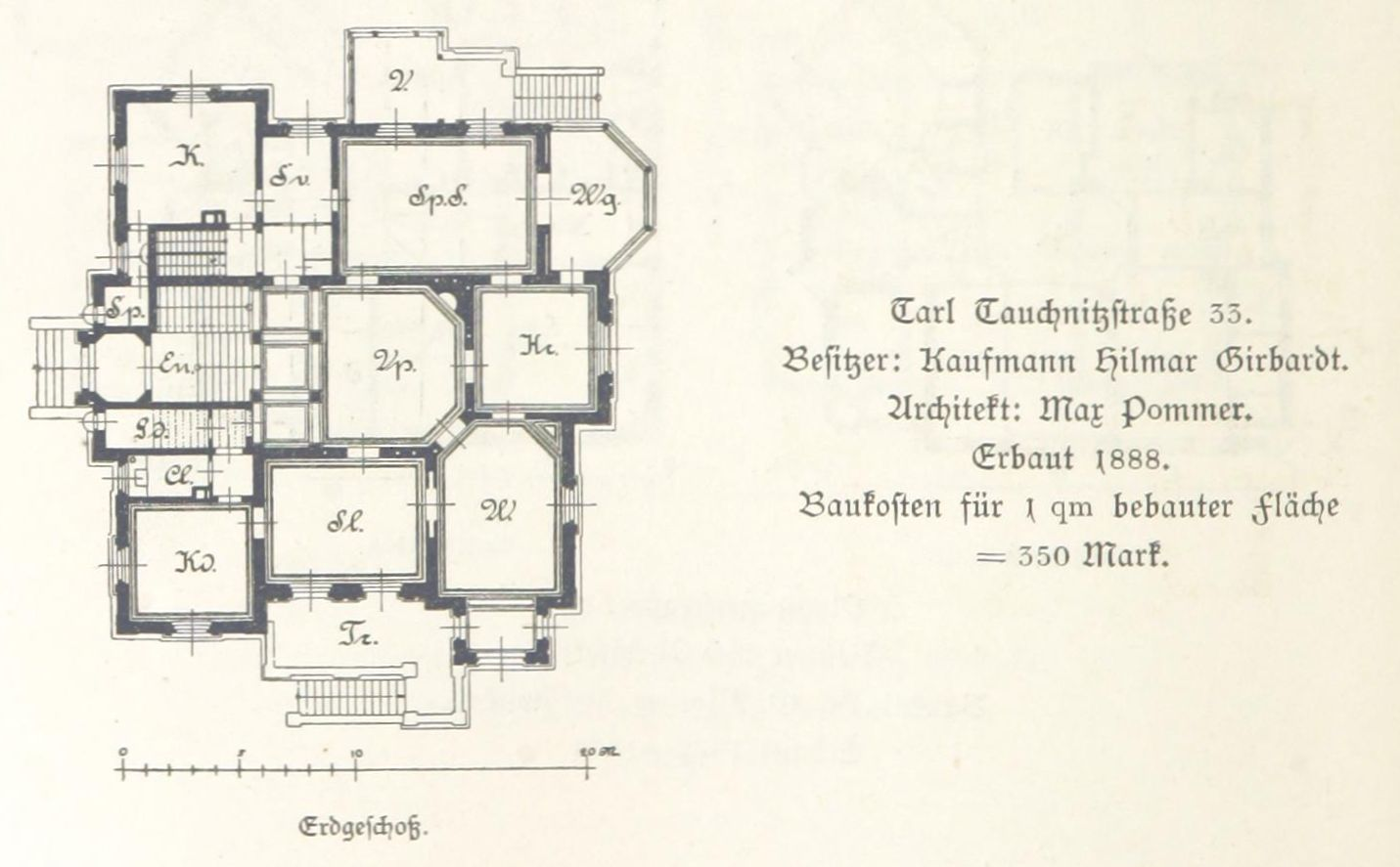 Villa Hilmar Girbardt in der Karl-Tauchnitz-Straße 17 (alte Hausnummer 33) im Leipziger Musikviertel. Erbaut 1888 von Max Pommer Grundriss